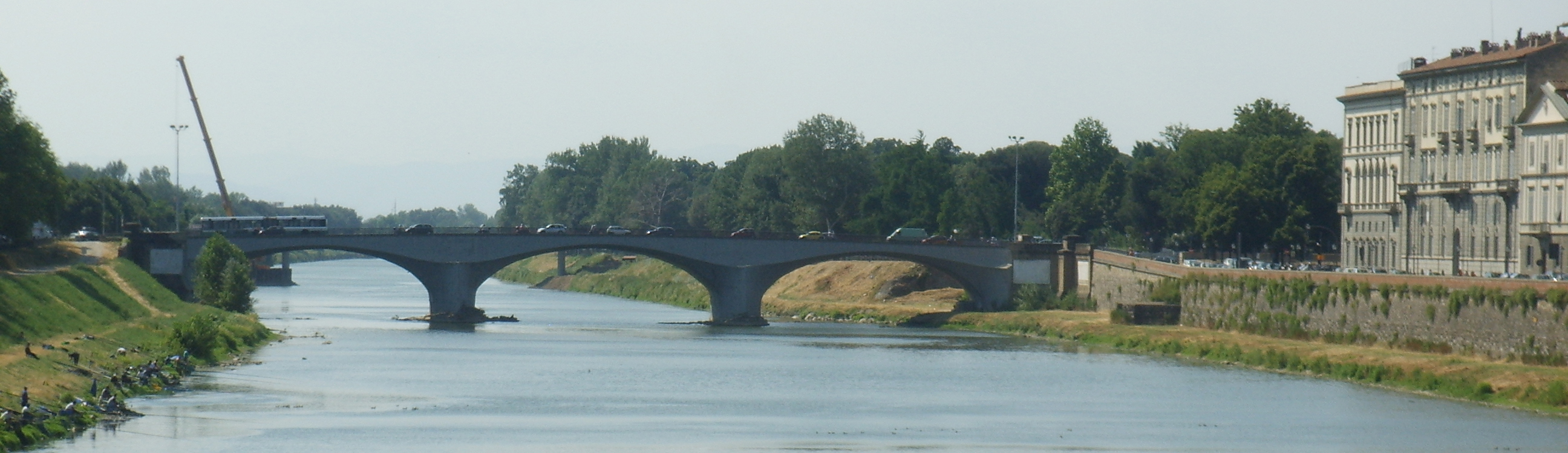 Ponte alla Vittoria, Florence, Italy